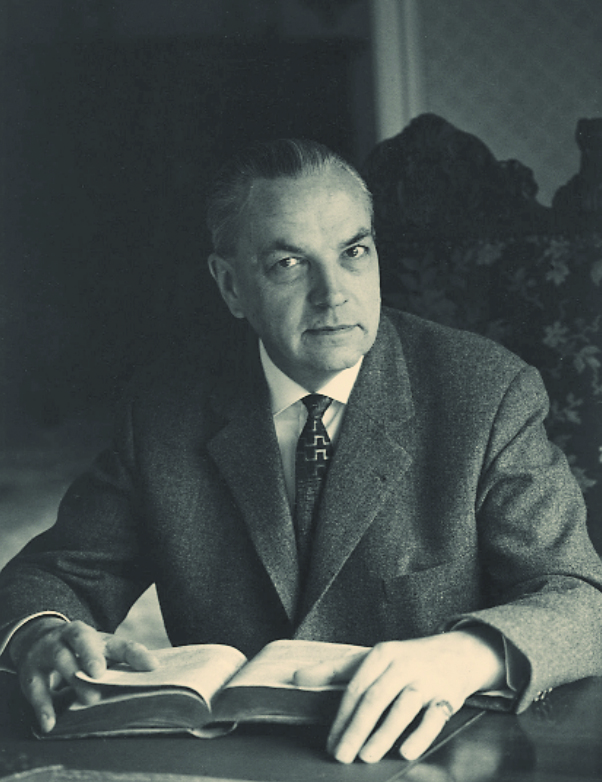 Josef von Fisenne übernahm direkt nach dem Krieg das Ruder in Hamburg.